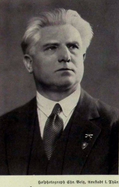 Portrait Artur Dinter von Hofphotograph Chr. Beitz, Arnstadt. In Artur Dinter: Die Sünde wider das Blut, 251.-260. Tausend, Hammer-Verlag, Leipzig (1934)